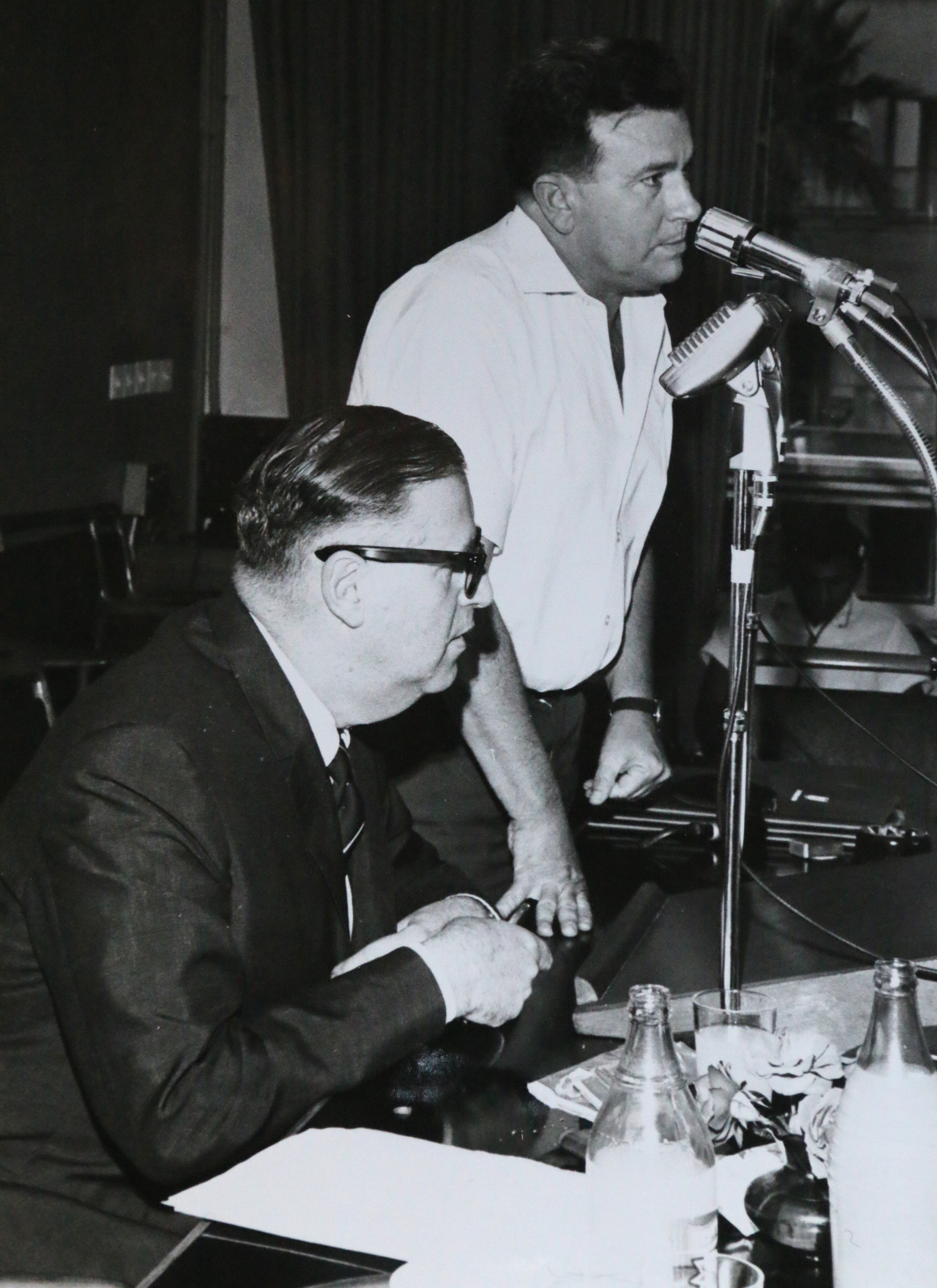 שר החינוך והתרבות אבא אבן במסיבת עיתונאים, לצד מנהל ההסברה והטקסים בישראל מר יהודה אילן בשנת 1961